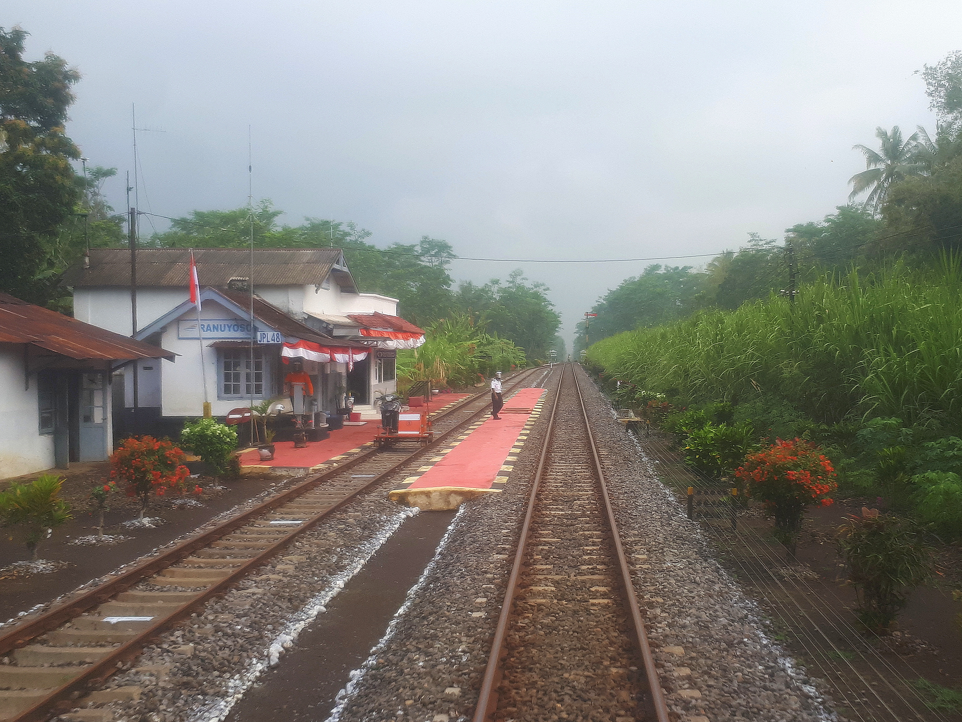 Emplasemen Stasiun Ranuyoso, 2020